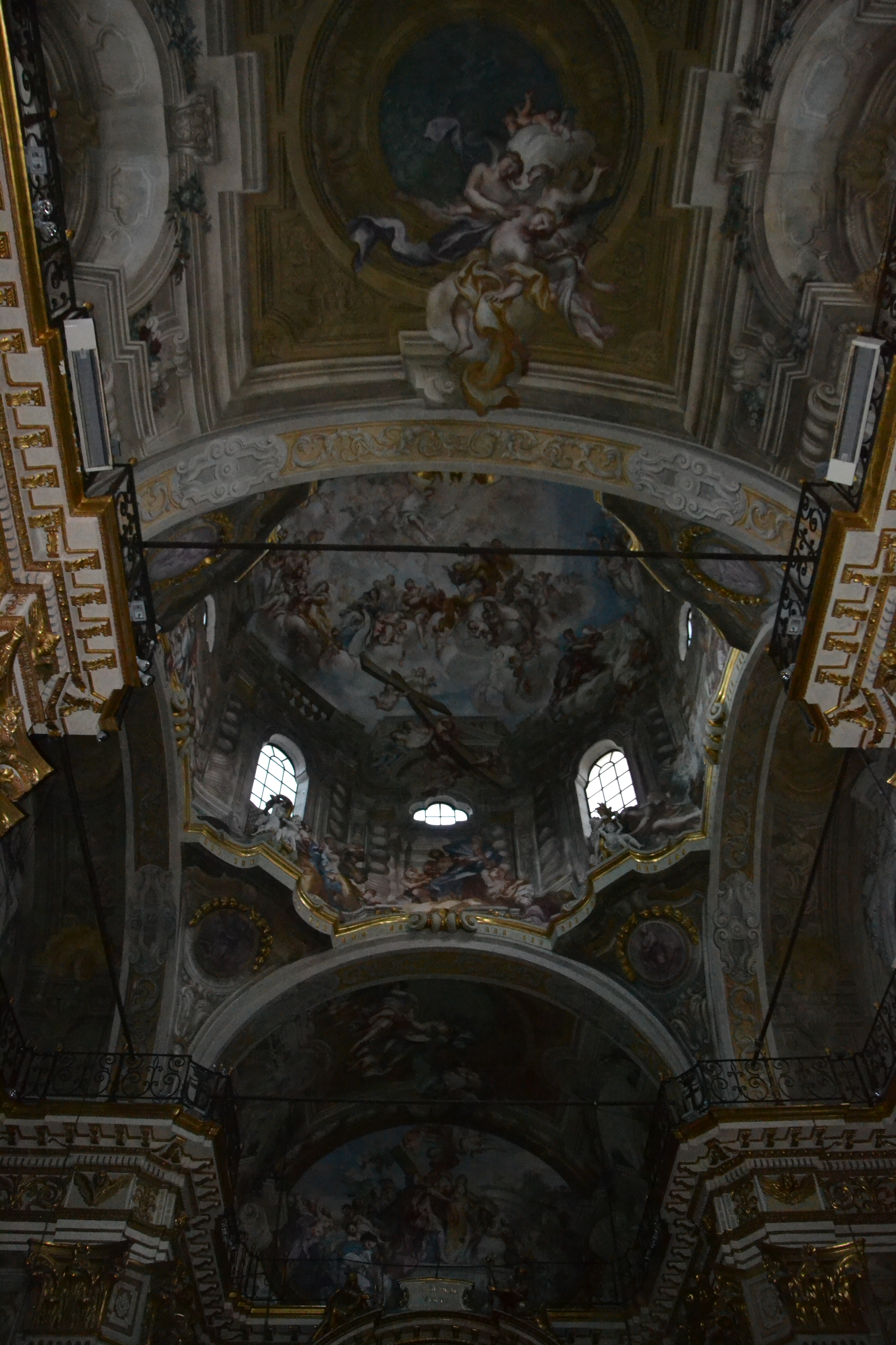 Gregorio De Ferrari e Lorenzo, Trionfo della Croce, Chiesa di Santa Croce, Genova